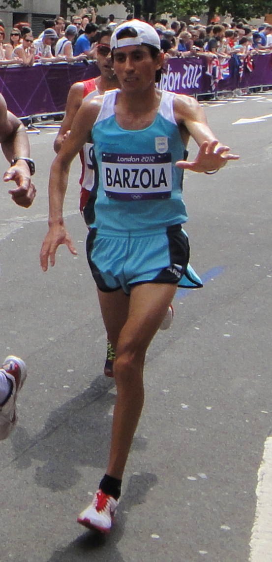 Miguel Barzola (Argentina) - London 2012 Men's Marathon